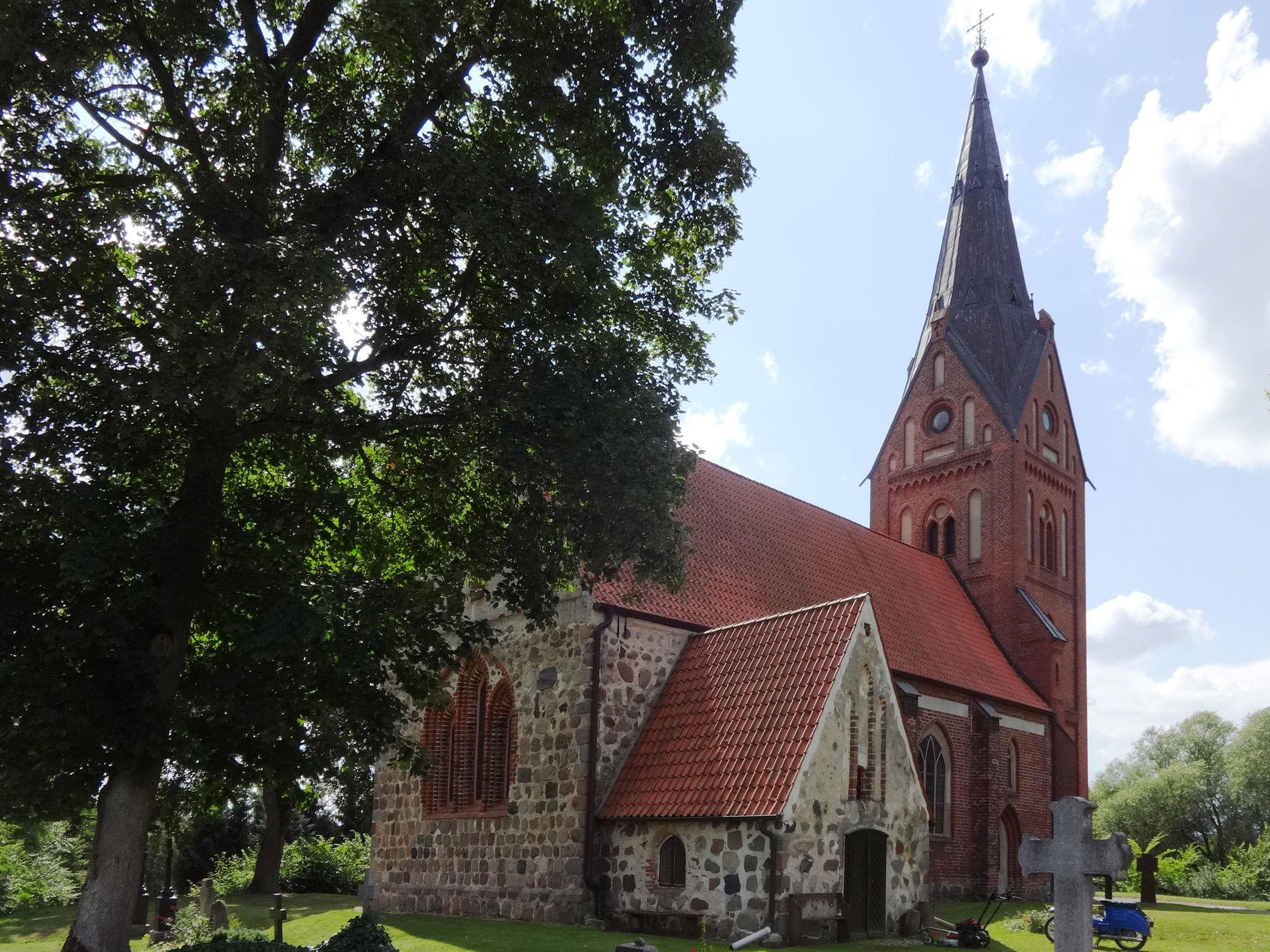 Die evangelische Kirche in Hanshagen wurde im 13. Jahrhundert als Feldsteinkirche erbaut. Im 15. Jahrhundert erweiterte die Kirchengemeinde das Bauwerk um ein Kirchenschiff aus Mauersteinen. 1885 kam der neugotische Westturm hinzu. Im Innern befinden sich ein Altaraufsatz von Johann Gottfried Quistorp aus dem Jahr 1798 sowie ein mittelalterliches Fresko des Heiligen Michael.